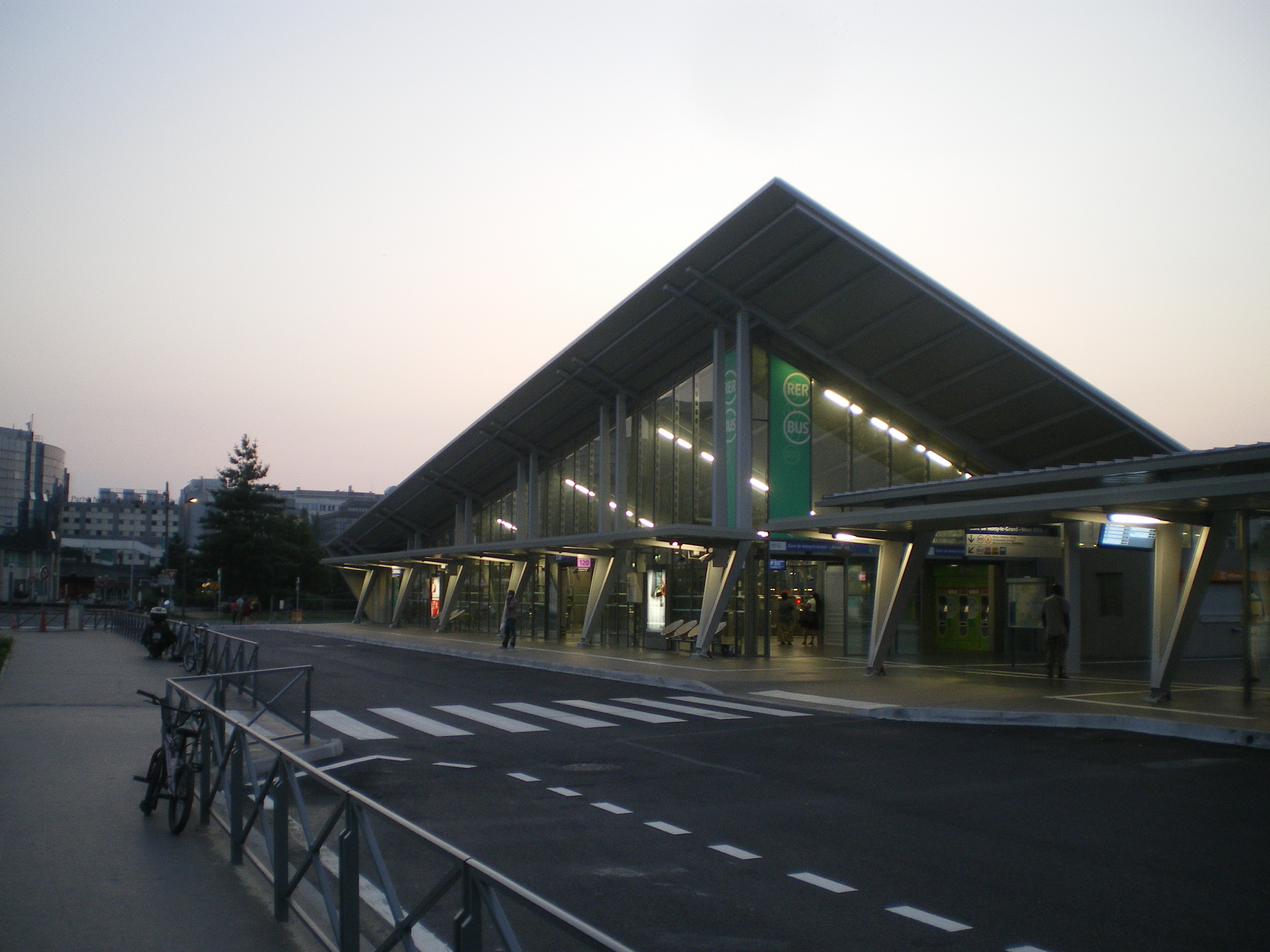 Gare de Noisy-le Grand-Mont-d'Est: Nouvelle gare routière